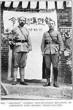 蒋中正和冯玉祥